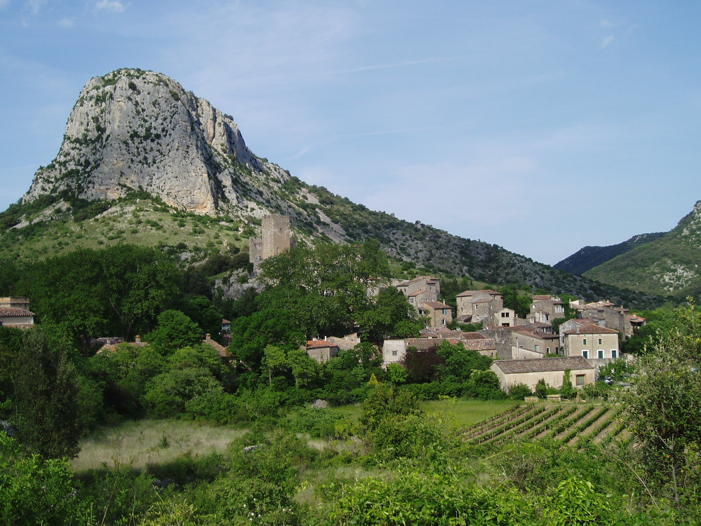 Description: Le village de Saint-Jean-de-Buèges, au pied du Roc de Tras Castel, entre le massif de la Seranne et le Causse de la Selle. Hérault, France. Source: Hugo SoriaLicence: GFDL Hugo Soria